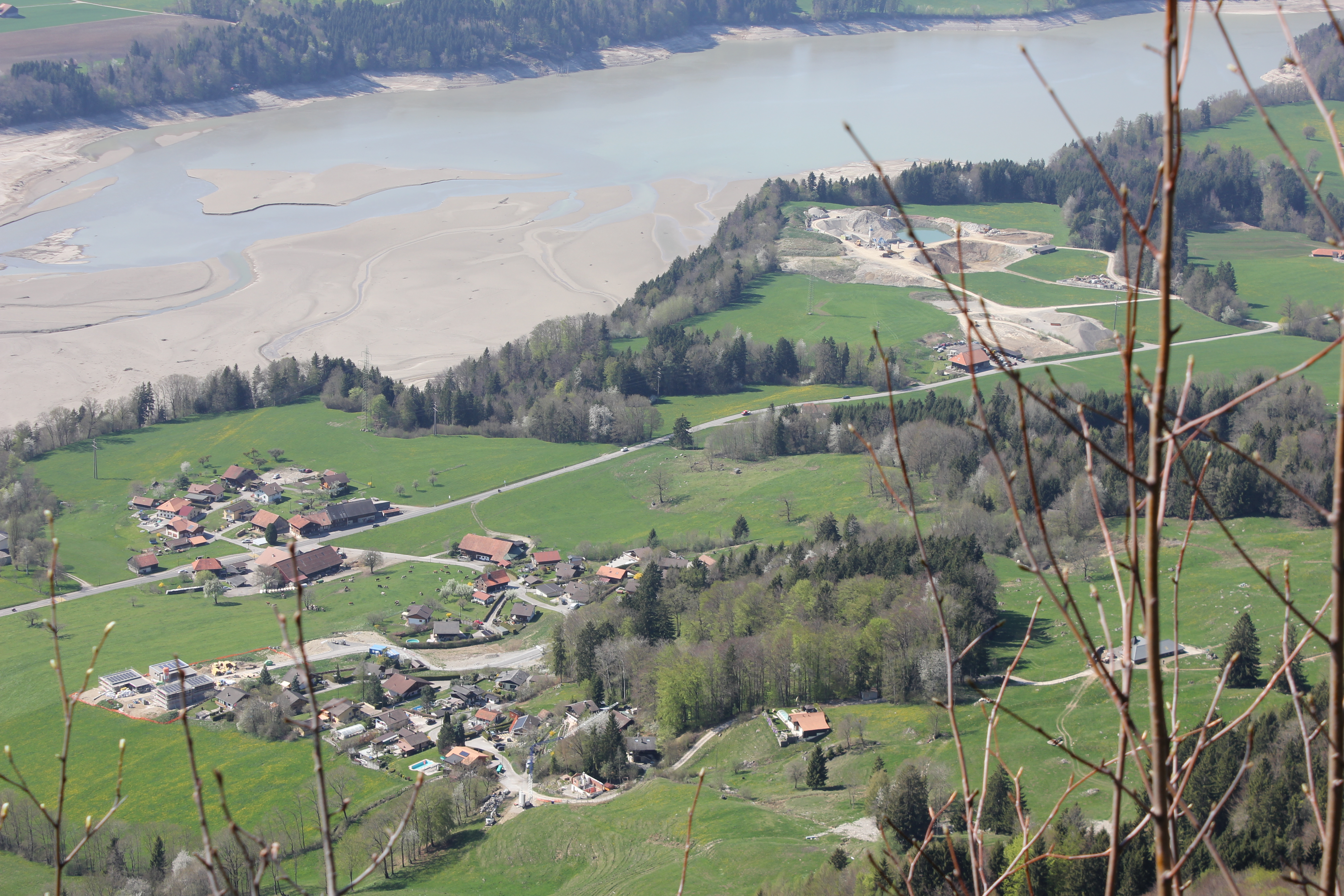 Vue de Villarbeney depuis le sentier menant à Biffé